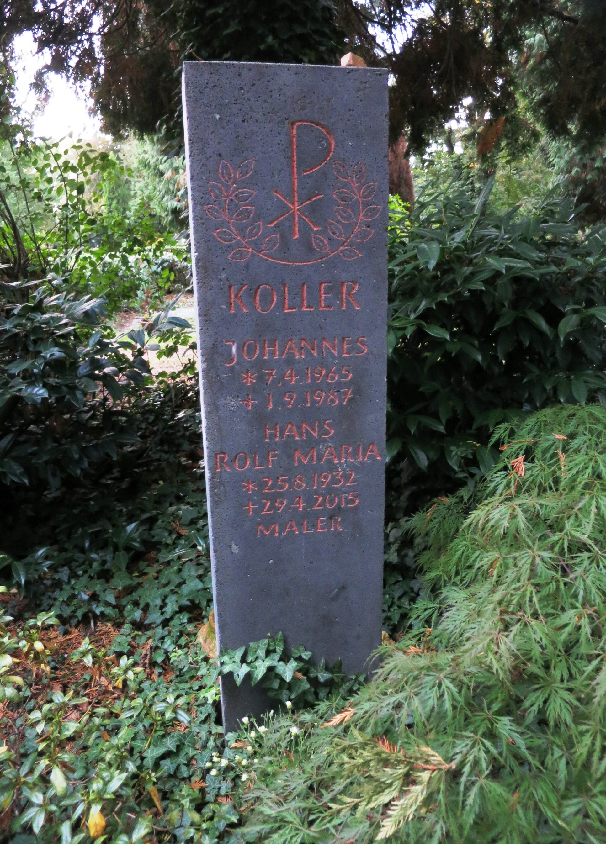 Hans Rolf Maria Koller - Grab Melaten-Friedhof